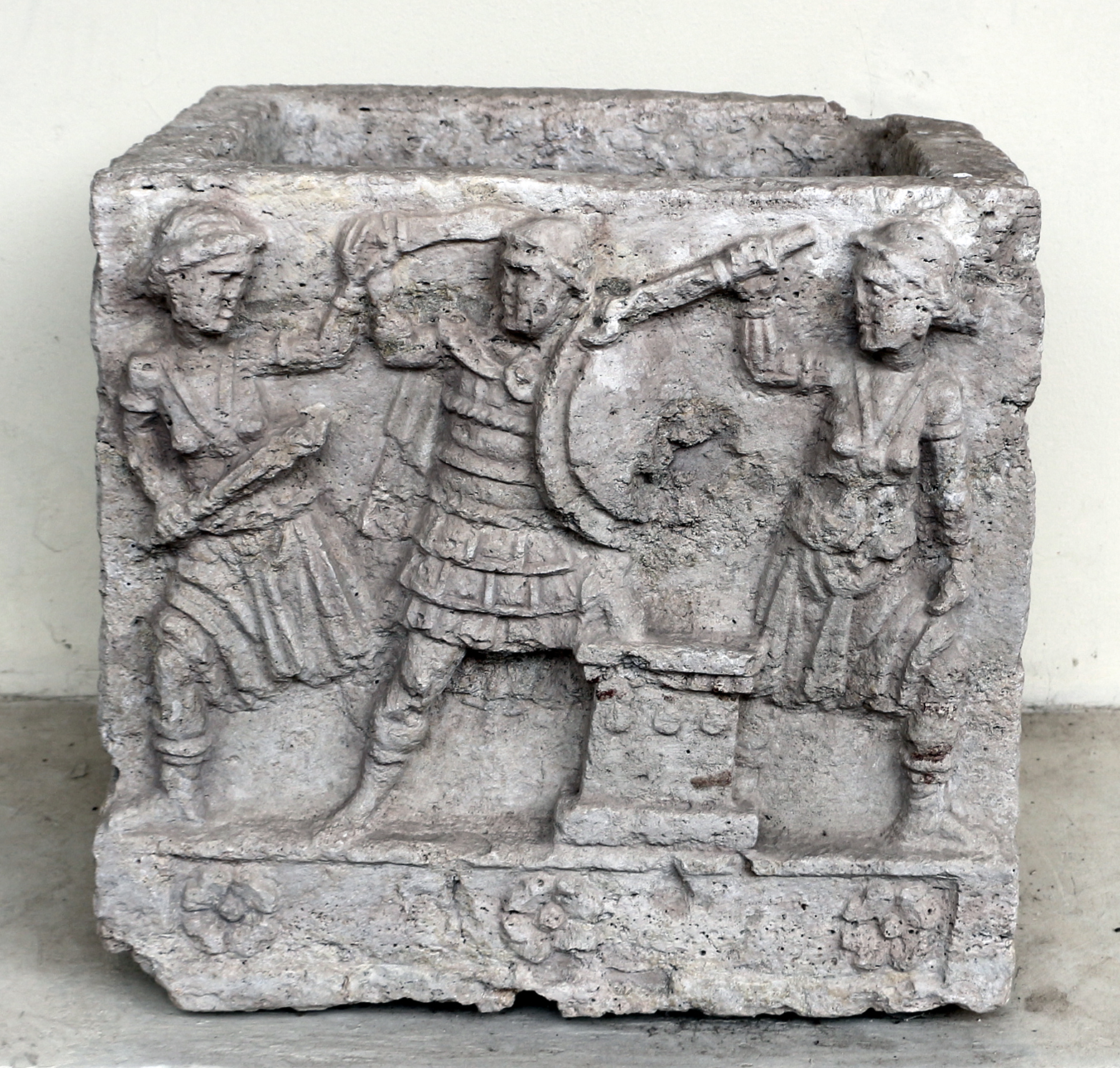 Museo Archeologico Nazionale dell'Umbria This is a photo of a monument which is part of cultural heritage of Italy.